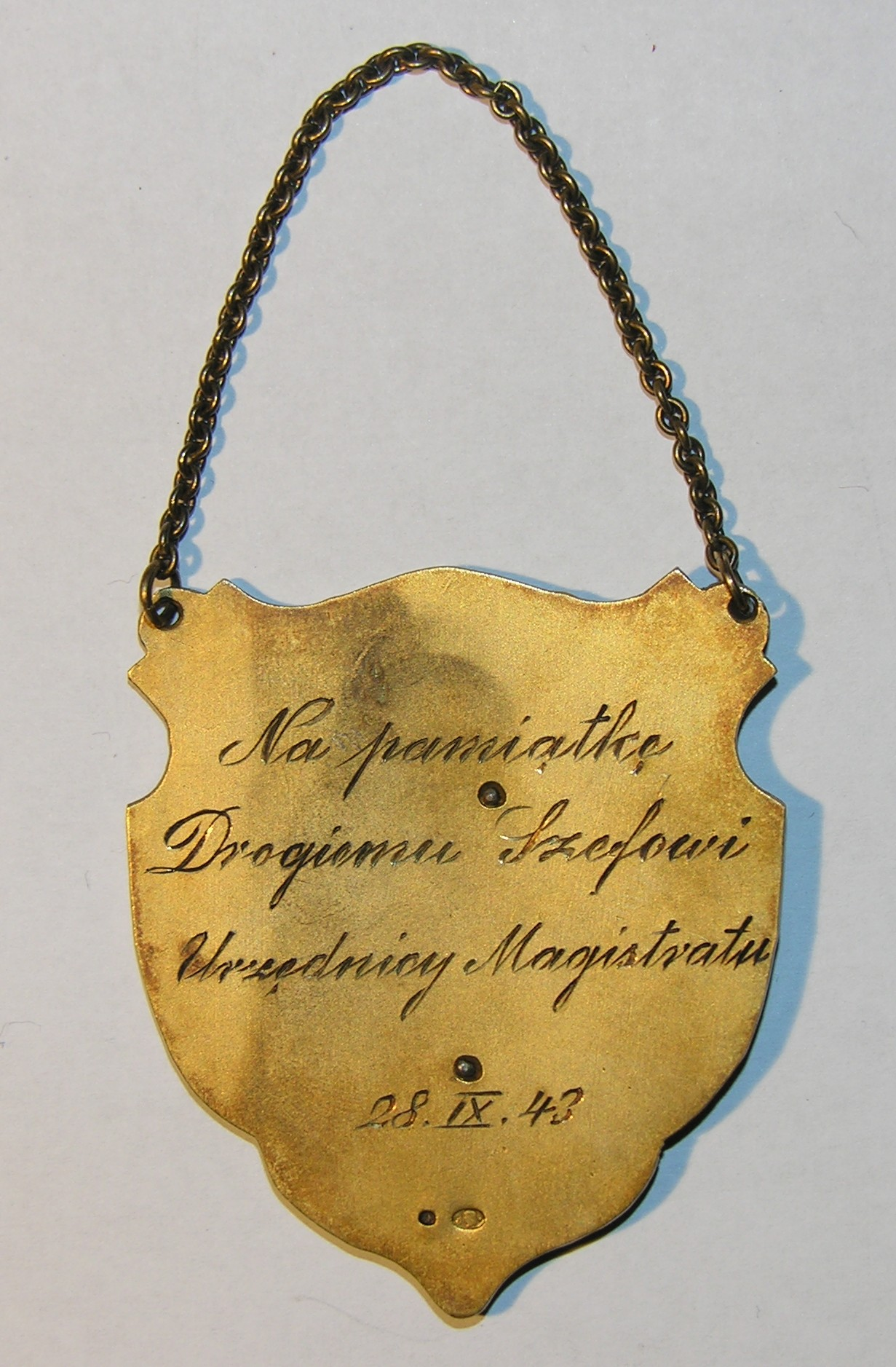 Wacław Chojna pamiątkowy Magistrat rewers